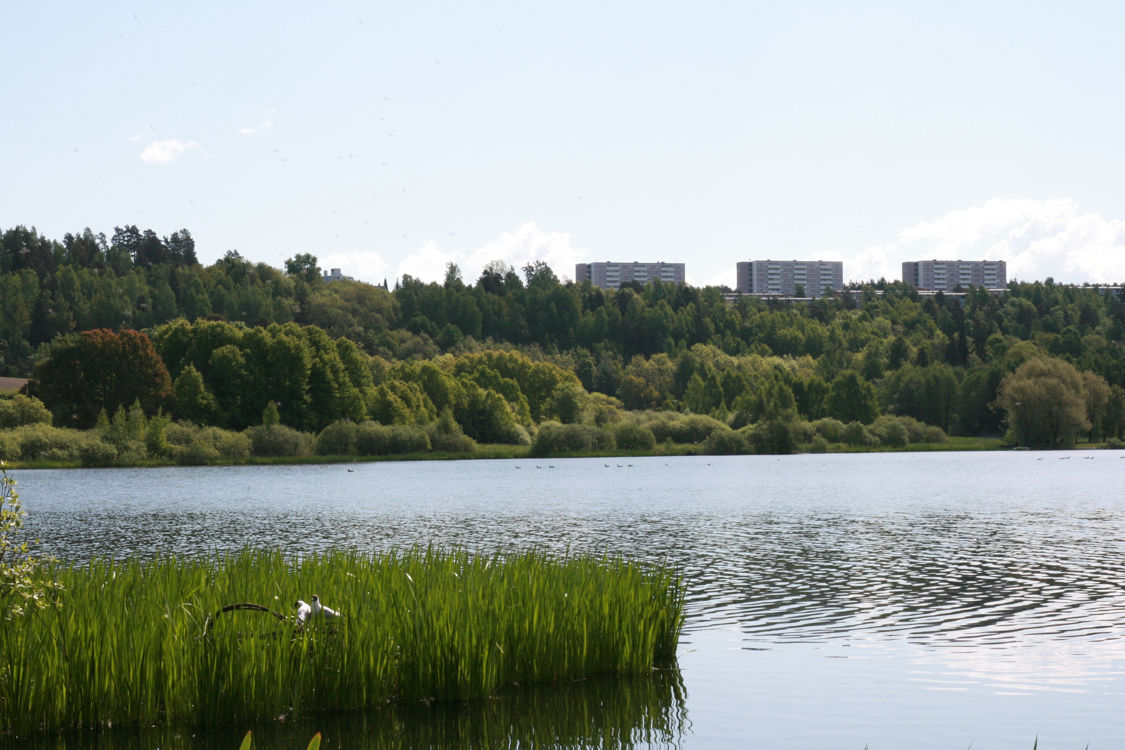 Østensjøvannet i Oslo. Høyblokkene på Bøler i bakgrunnen